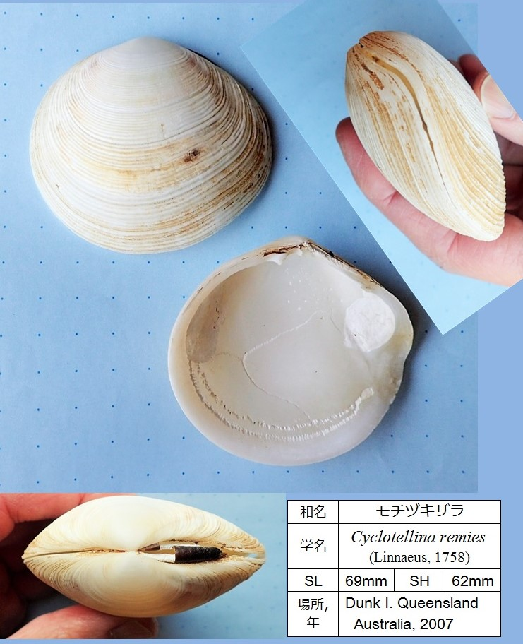 オーストラリア ダンク島産のモチヅキザラ